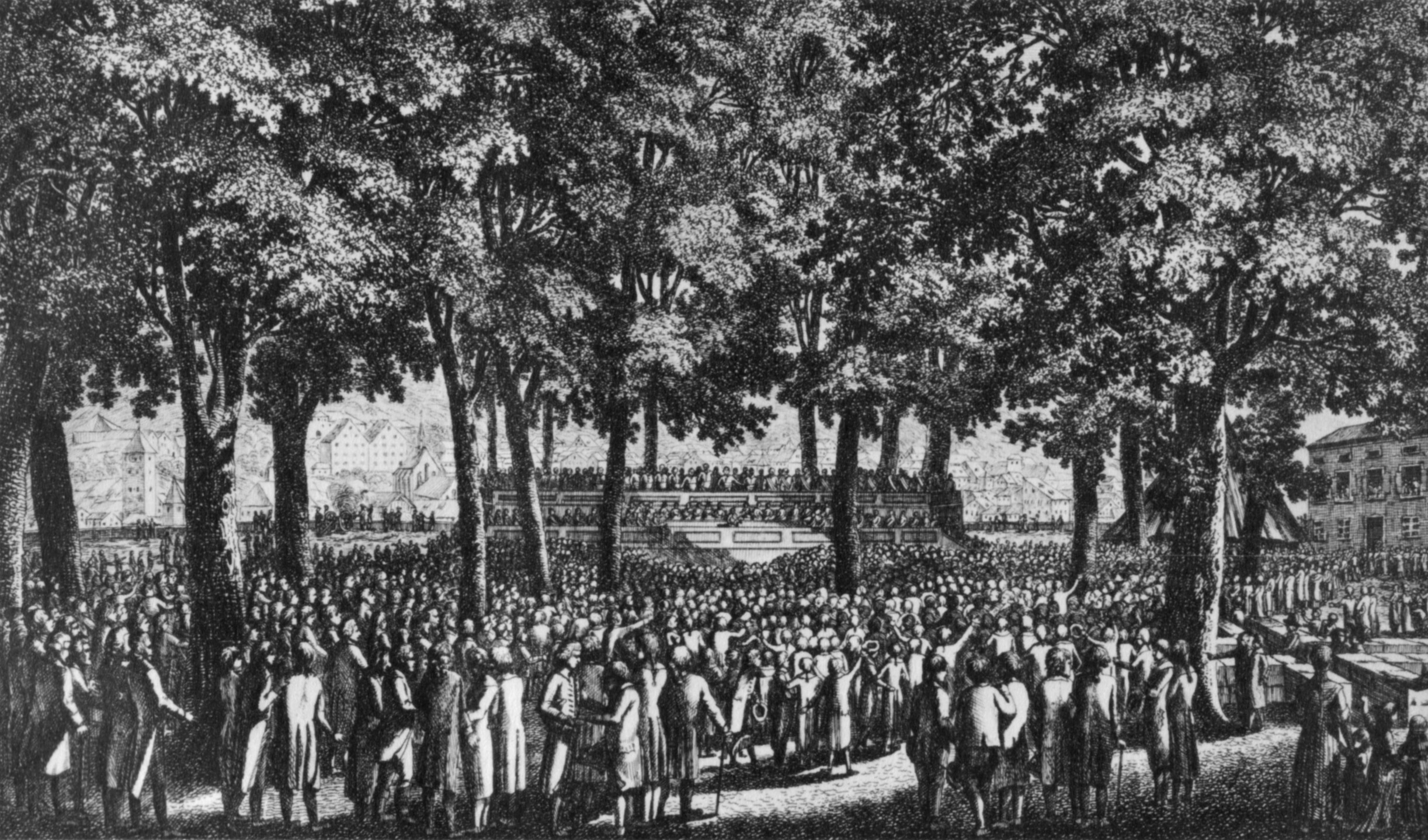 Die Bevölkerung der Stadt Zürich leistet auf dem Lindenhof den Eid auf die Helvetische Republik, 1798